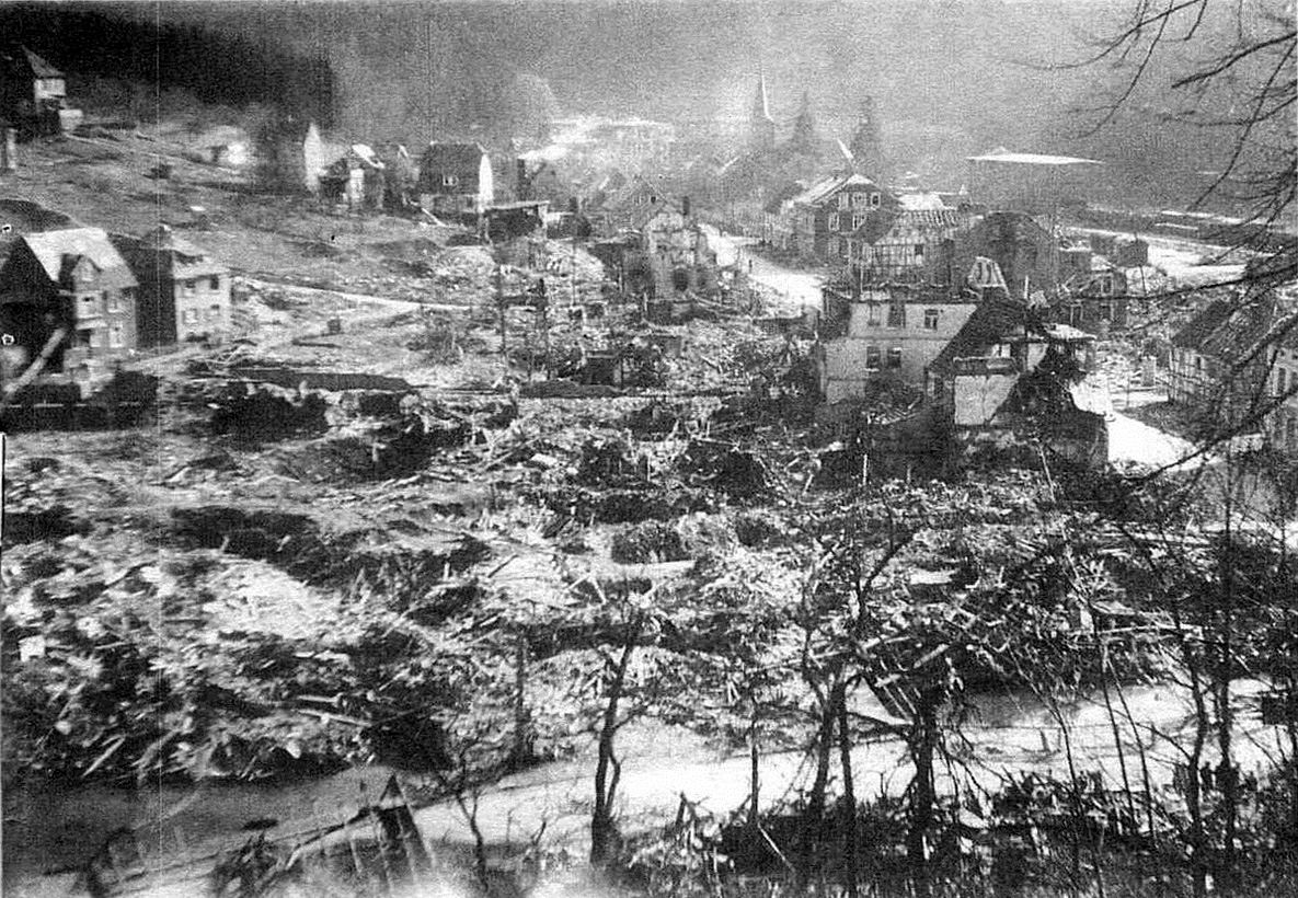 Zerstörtes Zentrum von Engelskirchen nach Bombardierung im März 1945